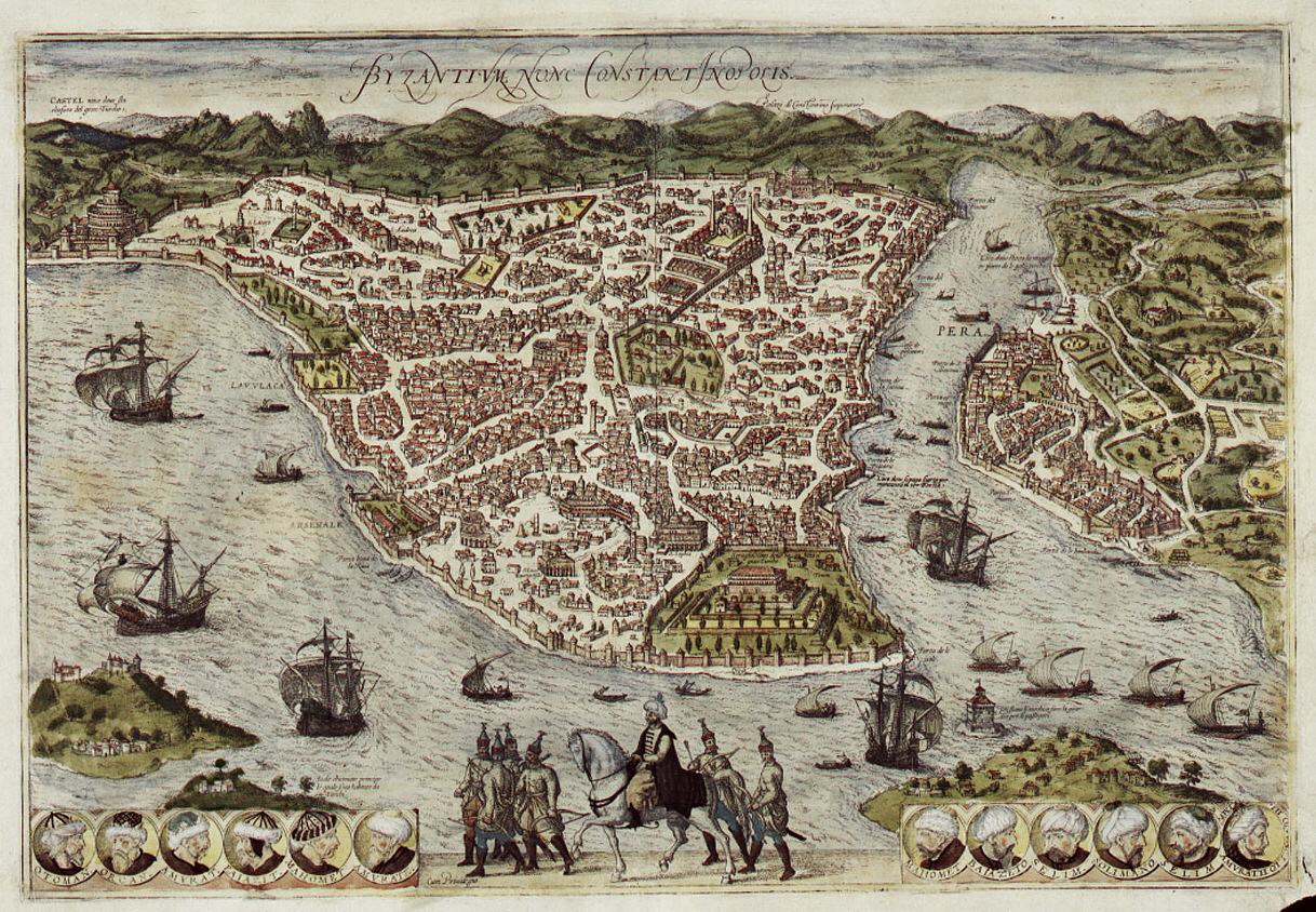 Byzantium / Constantinopolis